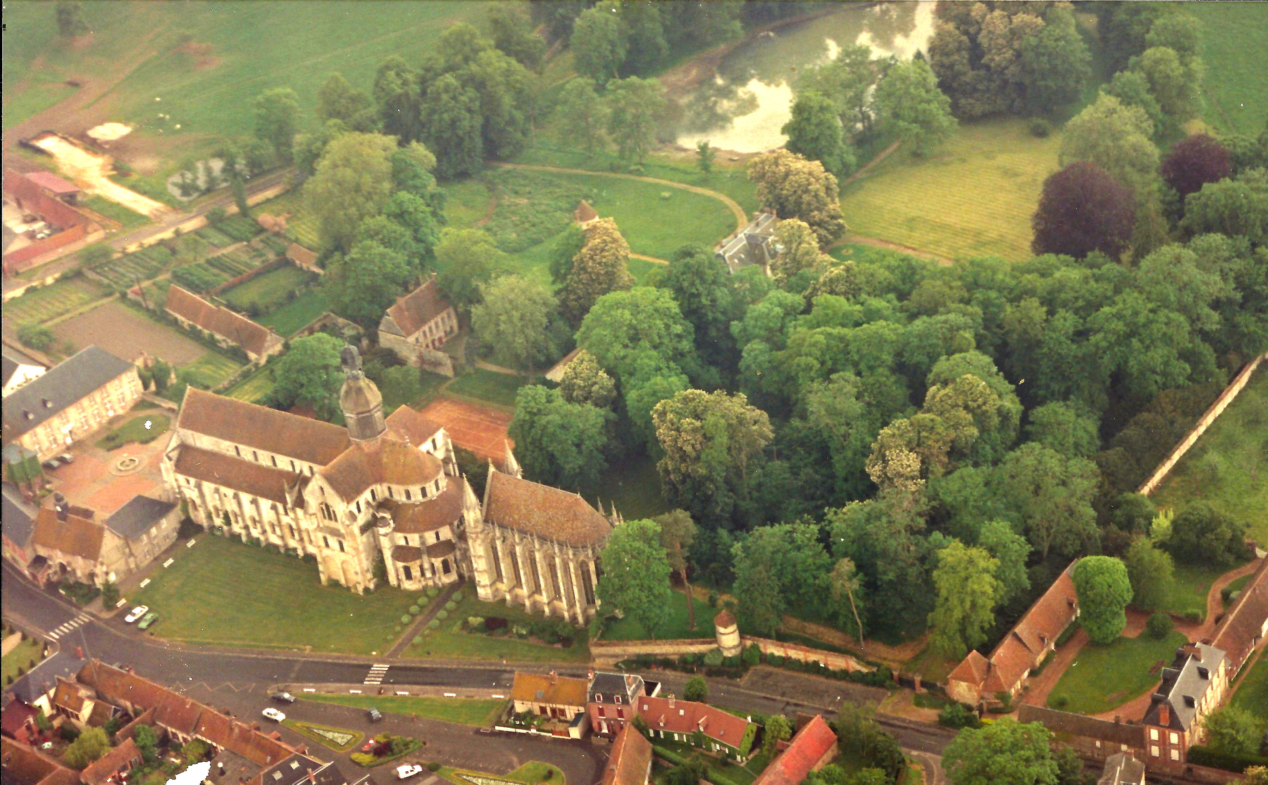 ABBAYE DE SAINT GERMER DE FLY Germer, personnage marquant du VII° siècle, fonde cette abbaye et en devient le premier abbé. Sous l'ordre de Saint-Ouen, archevêque de Rouen, le territoire de Fly est choisi afin d'y ériger un monastère. Une abbaye importante s'y élève bientôt, que Saint-Germer dirige jusqu'à sa mort, un 24 septembre vers l'an 658.